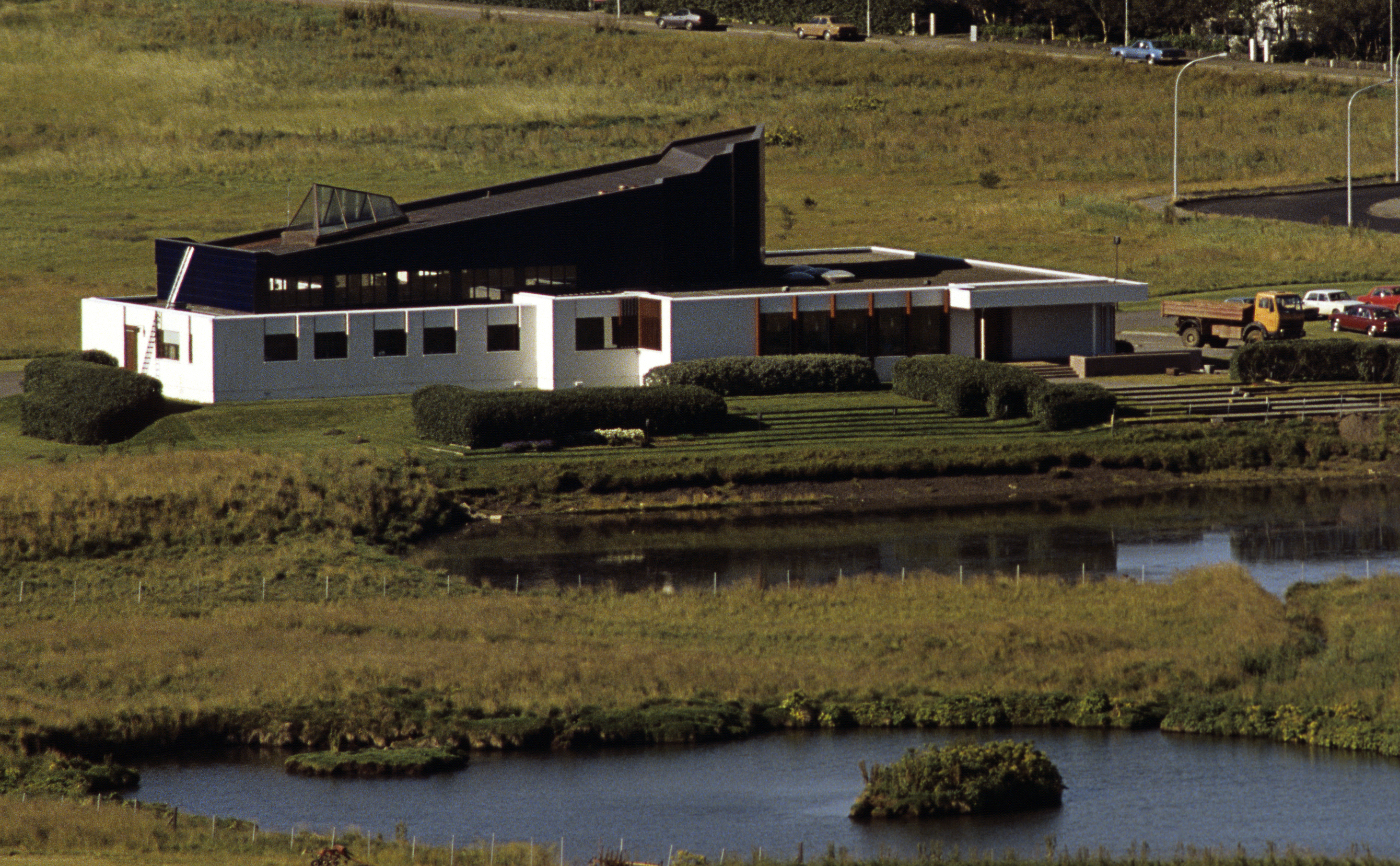 Reykjavík von der Hallgrímskirkja aus. Norræna húsið.